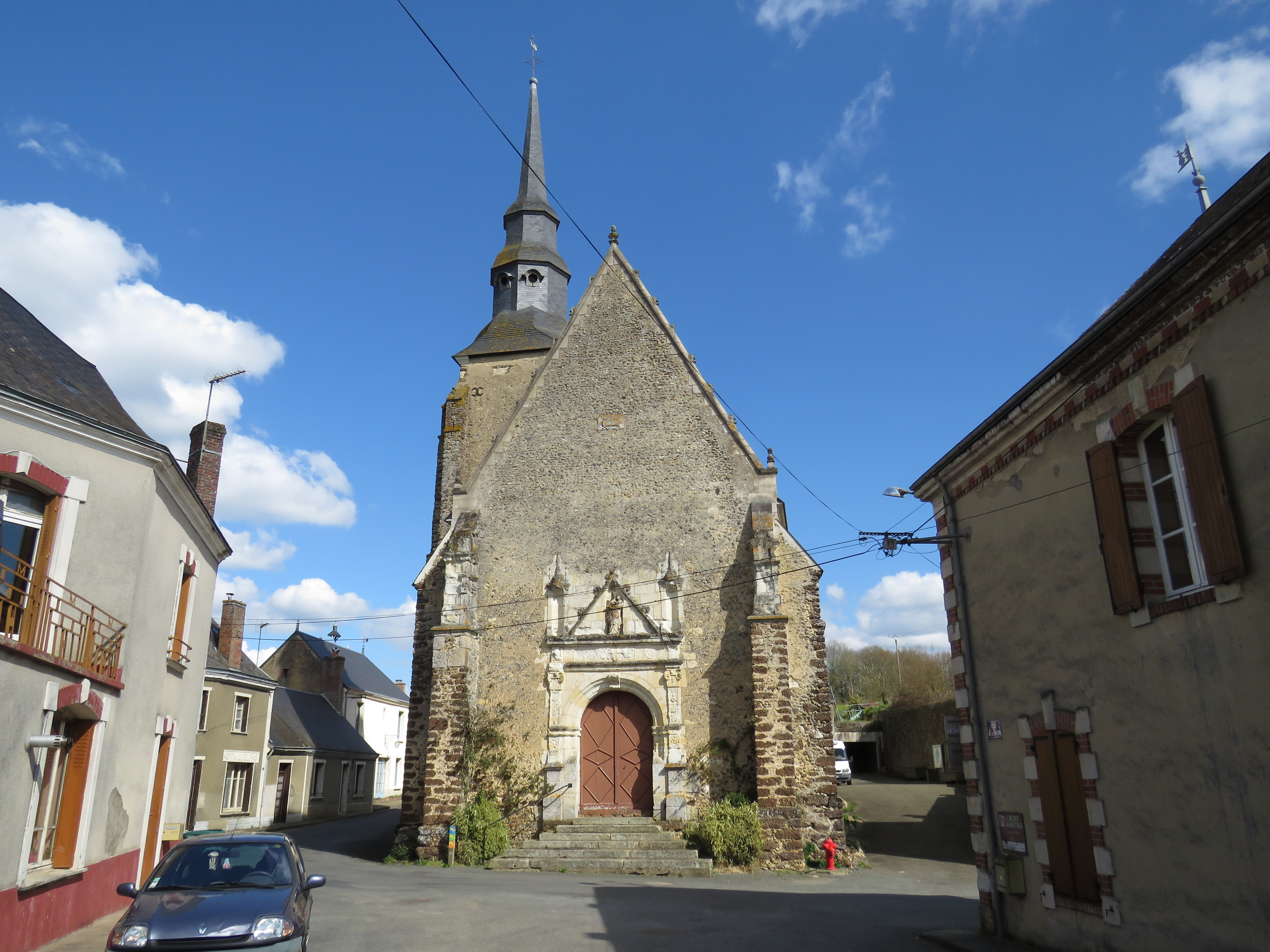 Église Sainte-Osmane